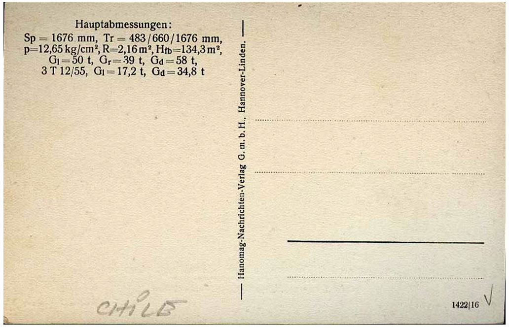 Sogenannten "geteilte Rückseite" (Revers) oder Adressseite der Ansichtskarte aus dem Hanomag-Nachrichten-Verlag GmbH in Hannover-Linden mit der umseitig gegebenen (fortlaufenden ?) Nummer Pk 11502. Im Textfeld finden sich die Daten mit den Hauptabmessungen der auf der Bildseite abgebildeten und beschriebenen Eisenbahn ...